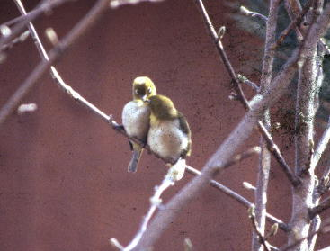 「目白押し」になっているメジロのつがい